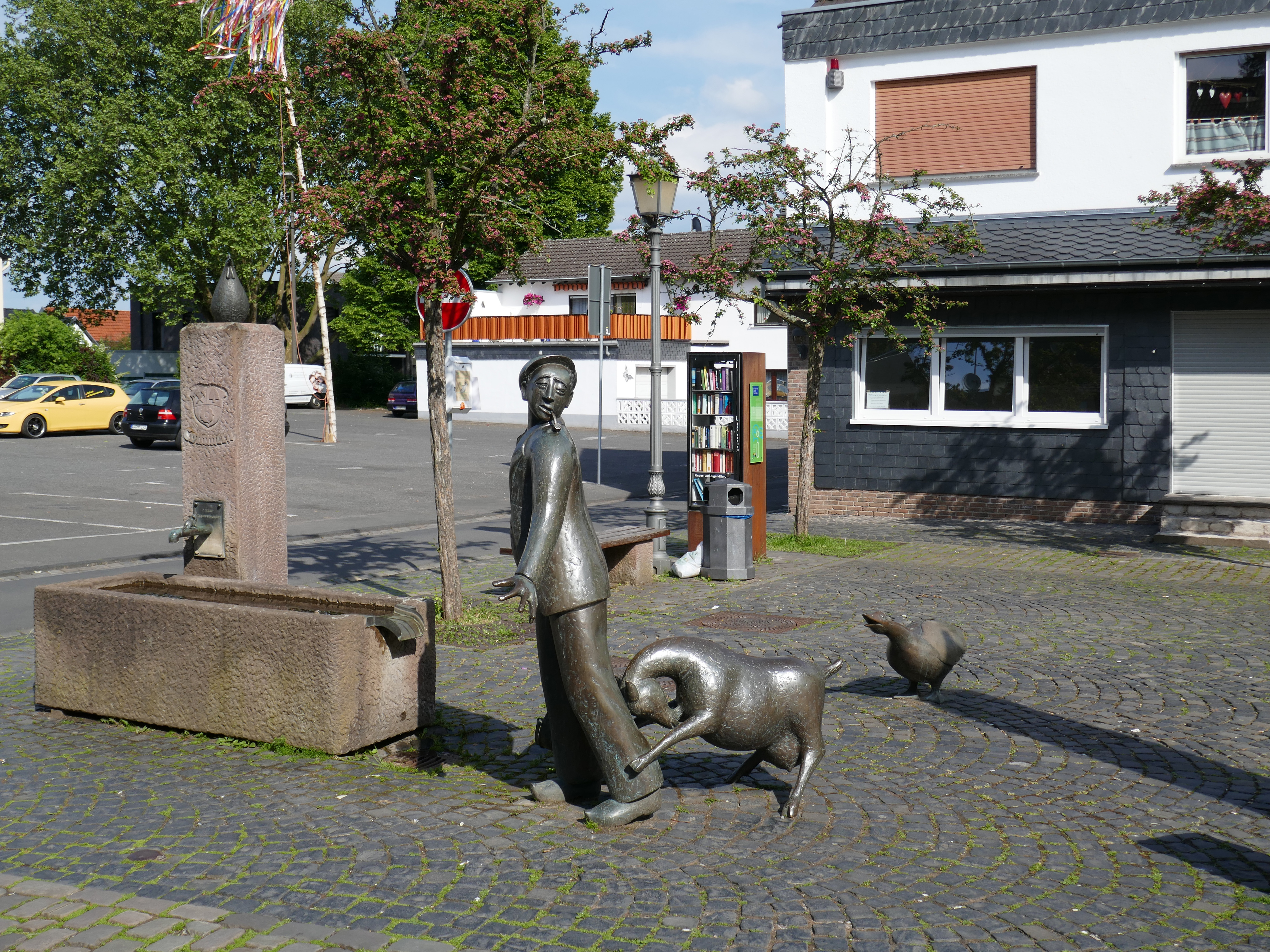 Ziegenbrunnen, Bronzestatue und öffentlicher Bücherschrank - Kölner Straße Ecke Ackergasse, Kommern.